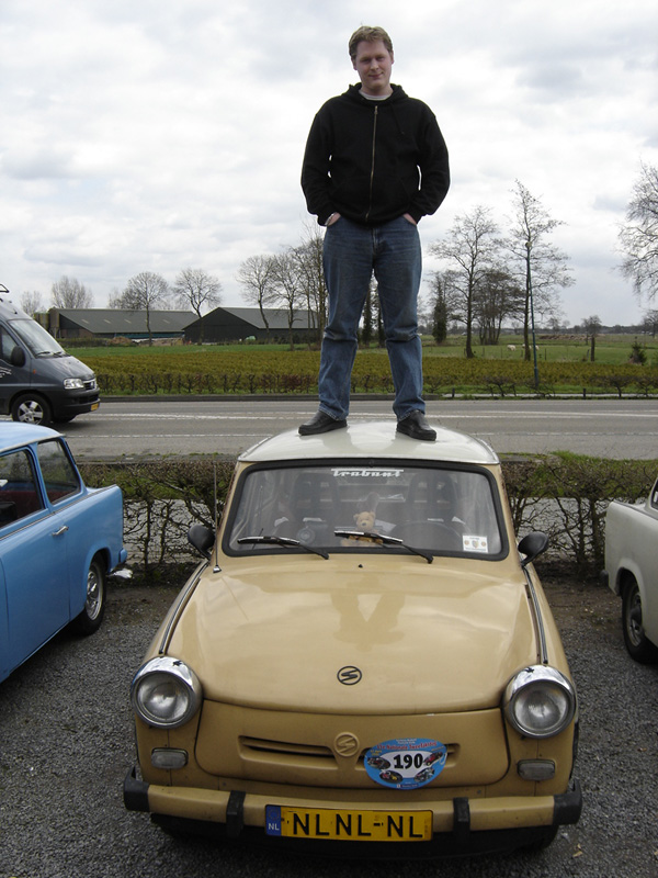 Duroplast is seven times stronger than steel.